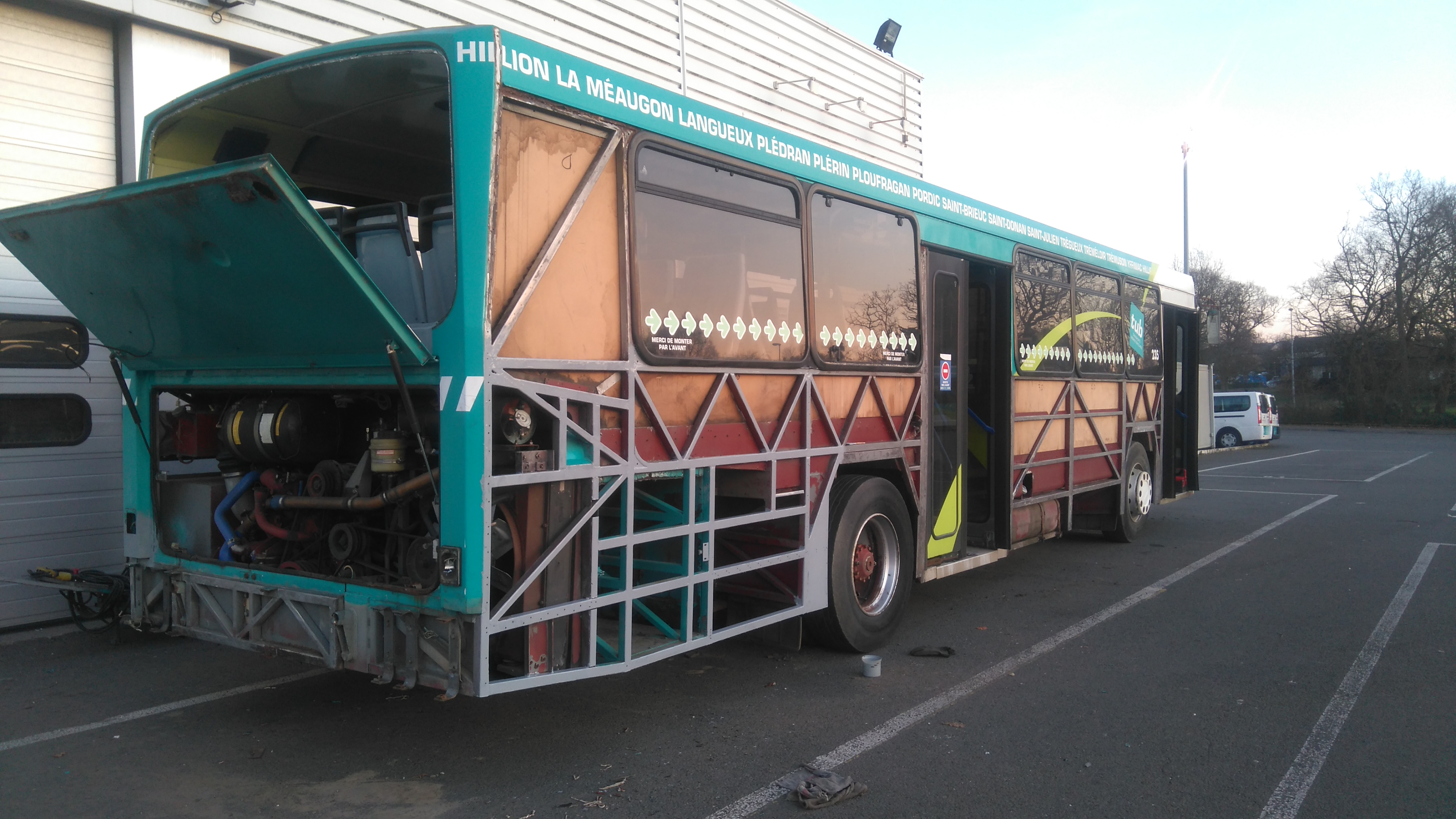 Renault PR 100.2 n°325 - HistoTUB - Restauration